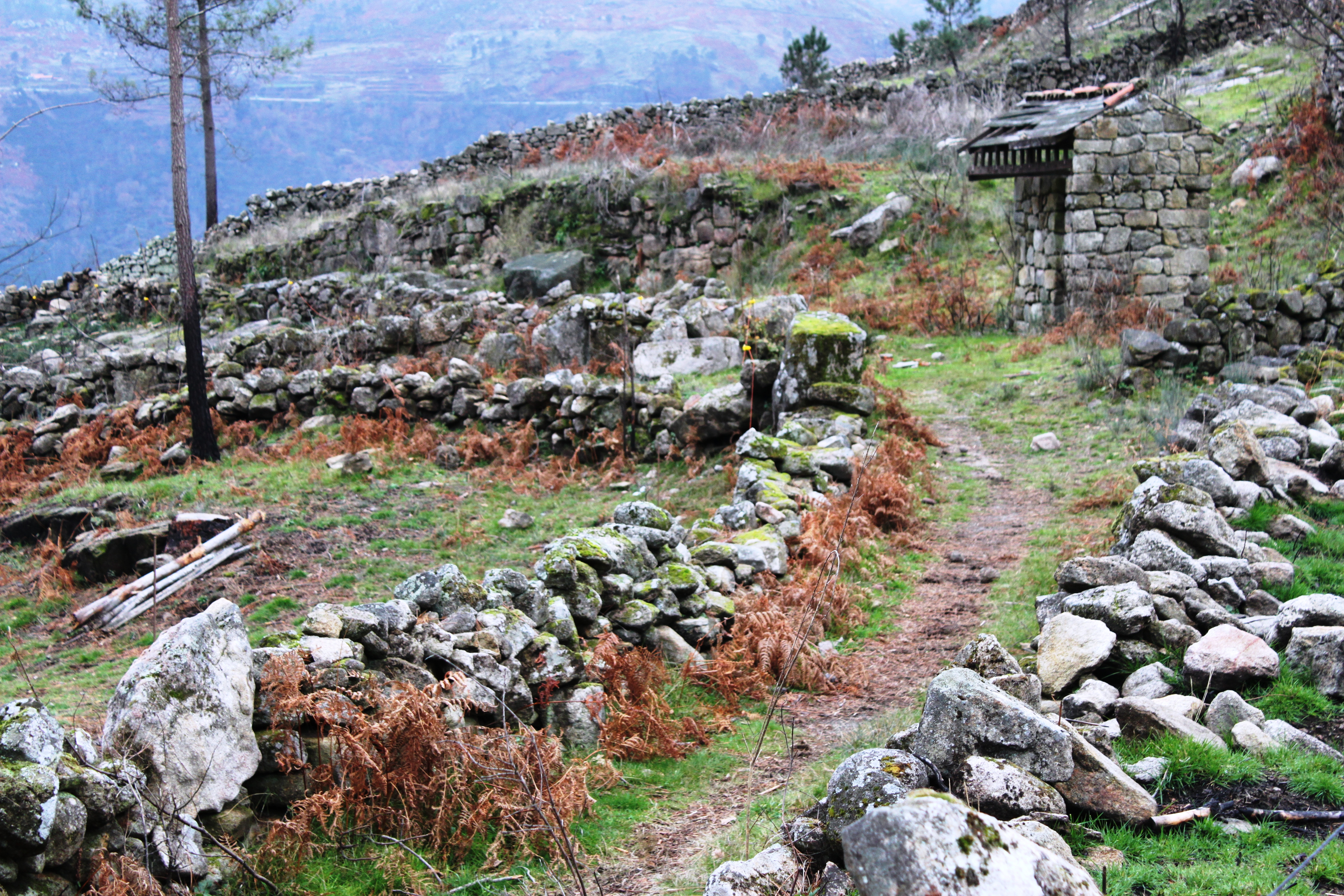 Castro das Coroas, Ferreiros - Cinfães